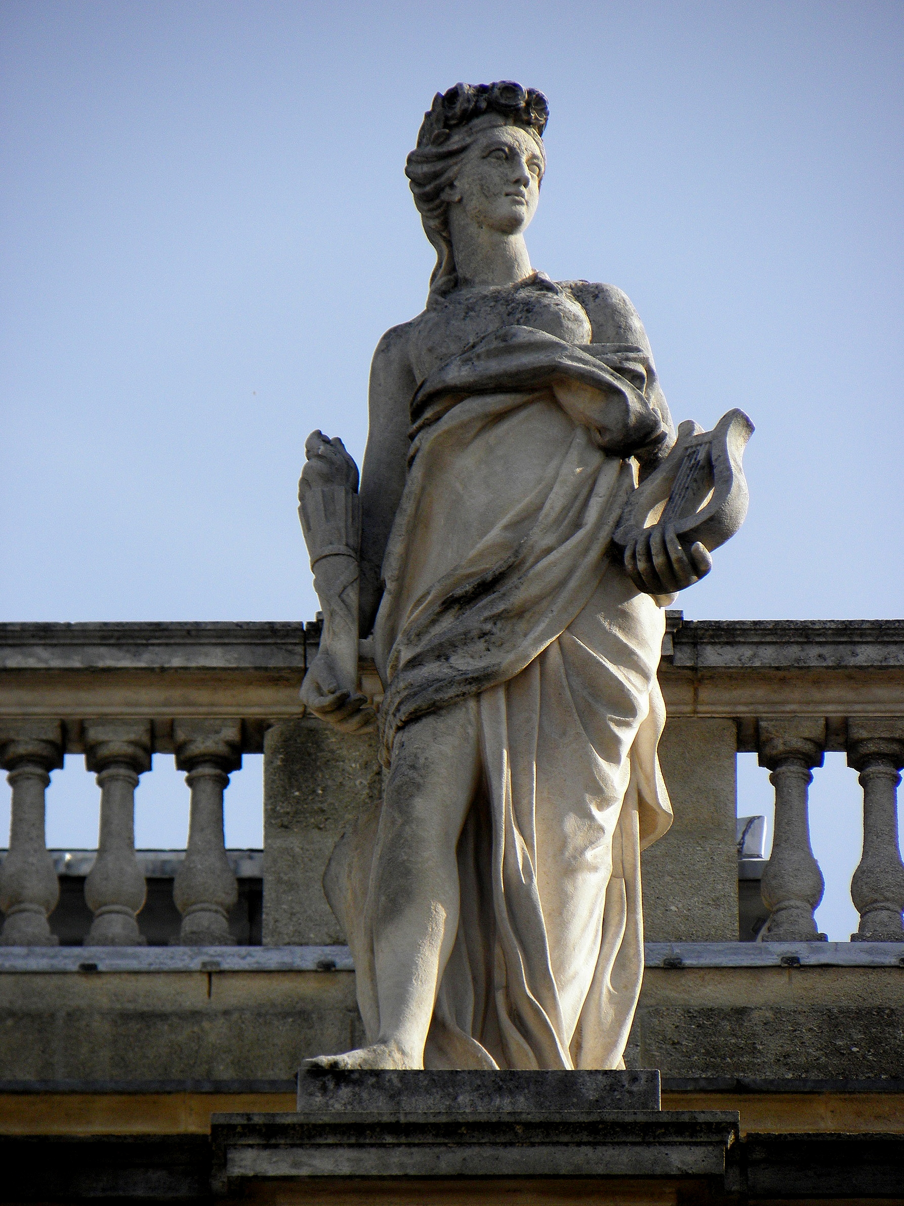 Grand-Théâtre de Bordeaux (33). Portique. Statue d'Érato, muse de la poésie lyrique.